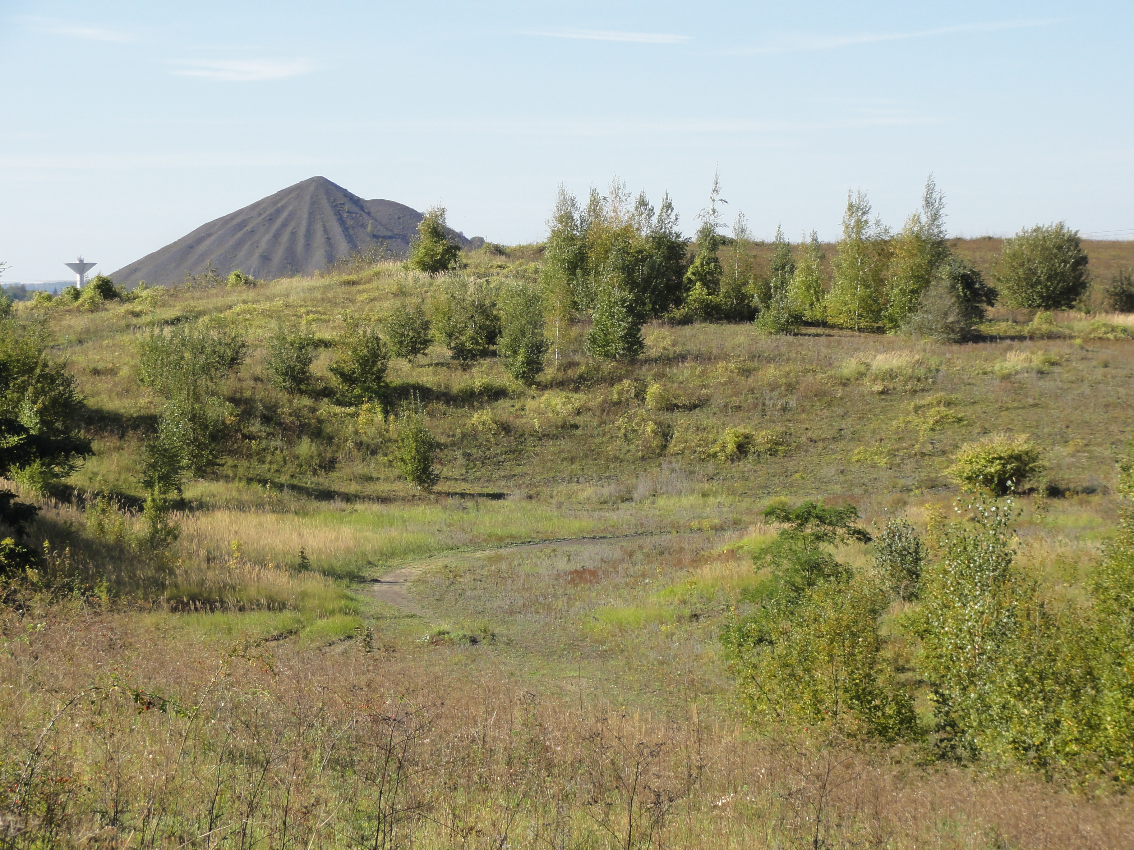 Terril n° 104 dit 10 Sud de Courrières sud, fosse n° 10 - 20 de la Compagnie des mines de Courrières dans le bassin minier du Nord-Pas-de-Calais, Billy-Montigny, Pas-de-Calais, Nord-Pas-de-Calais, France.